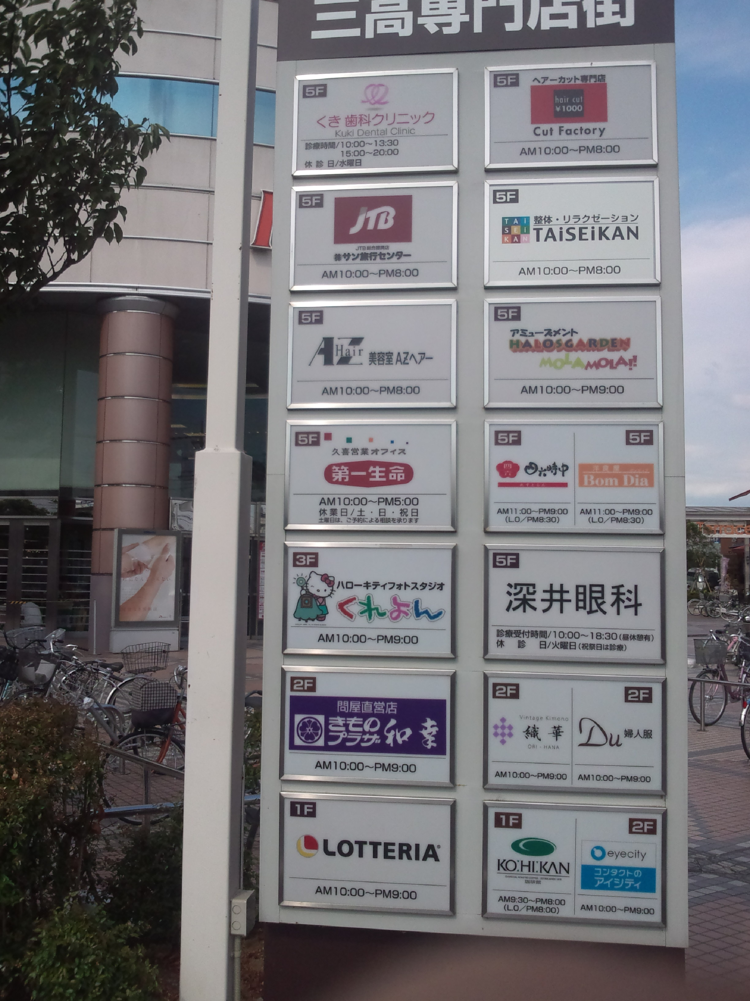 三高第1ビルの店頭前テナント一覧